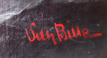 Signatur des Malers Vilhelm Bille